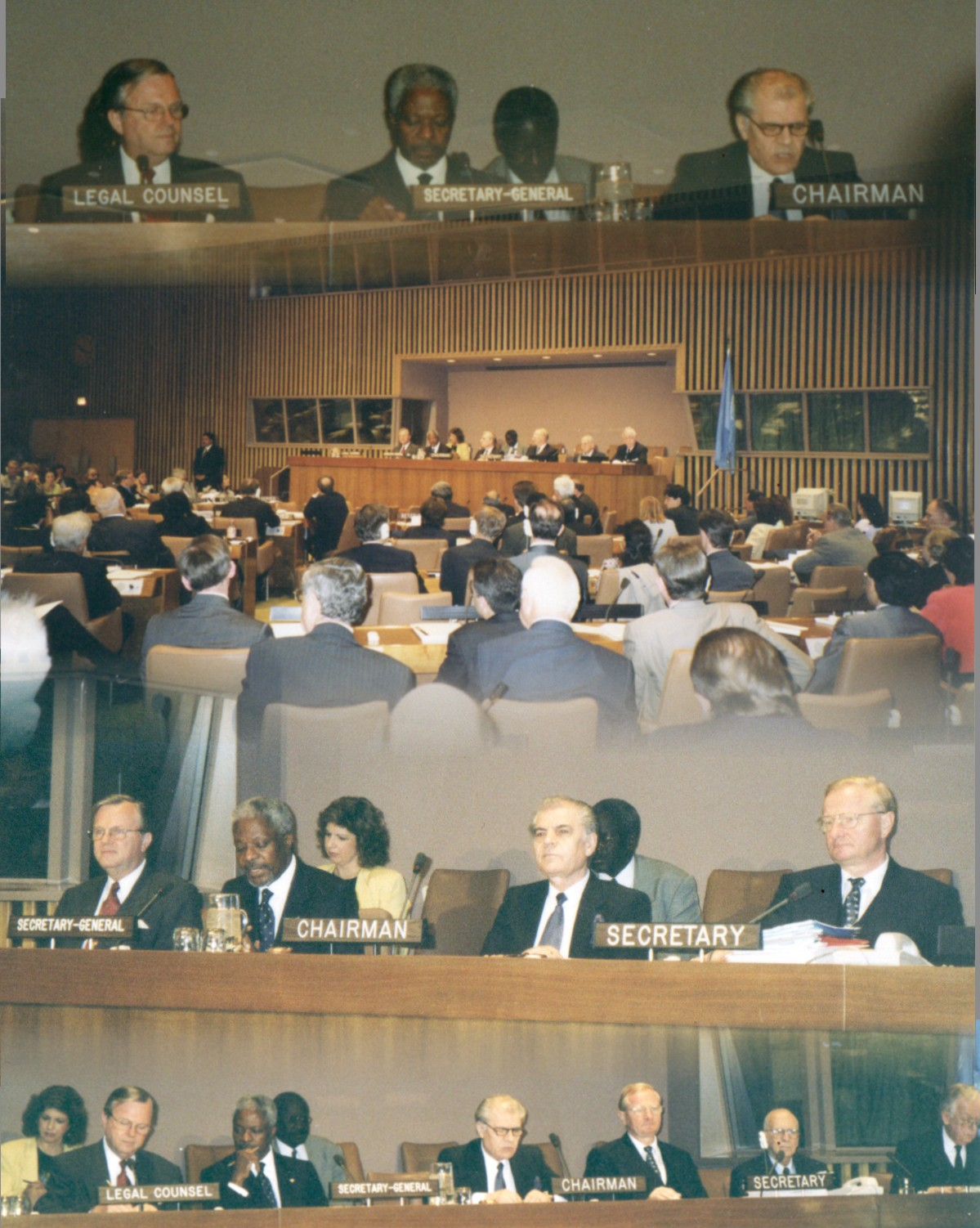 Seance de la Comission des Nations Unies sur l'utilisation pacifique de l'espace cosmique